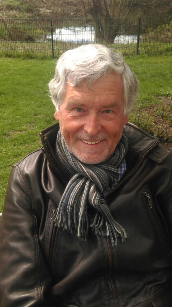 Gunther Gerhardt in Wedel, September 2015